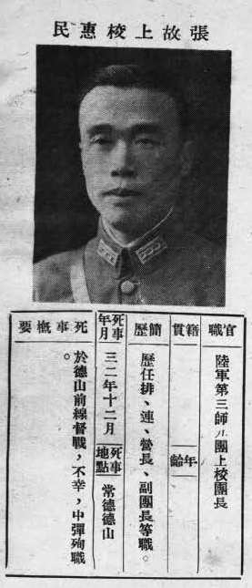 中文（台灣）: 抗戰軍人忠烈錄第一輯中的烈士遺像